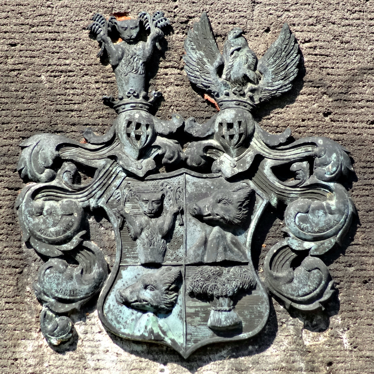 Wappenstein am Brunnen der Pferdeschwemme am Gut Neuhof (Leihgestern), Inschrift: „G Firnhaber Jordis von Eberstein 1845“ vgl. dazu: Maximilian Gritzner: Standes-Erhebungen und Gnaden-Acte verliehen von den Landgrafen und Grossherzögen zu Hessen-Darmstadt, In: Standes-Erhebungen und Gnaden-Acte deutscher Landesfürsten während der letzten drei Jahrhunderte, 2 Bde., Starke, Görlitz 1880/1881, Band 2. Braunschweig bis Württemberg, S.519-520 (14.4.1826) Firnhaber von Eberstein, A. (unter diesem Namen) für Georg Christian Rudolf Jordis, Neffe (einziger Sohn seiner † Schwester der Frau Geheimeräthin Jordis in Frankfurt am Main) und Adoptivsohn (seit 1812) des 1849 kinderlos als Letzter eines alten (de dato Wien 23. 7. 1755, in Person des Johannes Bernhard Firnhaber, Kaiserlicher Rath und Schöffens der Reichsstadt Frankfurt am Main, nebst Gebrüder Philipp Christian Firnhaber, Löwenstein’schen Gehmeimen Raths, Oberamtmann und Residenten zu Frank- furt, sowie der beiden Mitglieder des 51er Kollegiums der Reichsstadt Frankfurt am Main: Conrad Hieronymus und Johann Friedrich Firnhaber, mit „von Eberstein“ in den Reichs-Adelsstand erhobenen) Frank- furter Geschlechts † Kurhessischen Kammerherrn Johann Konrad Firnhaber von Eberstein auf der Schmitte bei Giessen. Der Noble erhielt ganz das Wappen seines Adoptivvaters, nämlich: Geviert; I. gespalten Blau Gold, darin wachsender, vorwärts gekehrter Löwe verwechselte Tinktur, hält in jeder Pranke 3 goldene Hafer-Aehren, 2/3 : in Silber über # Dreifels ein # Eberkopf rechtsgekehrt, IV.: in Blau eine goldene Hafergarbe. — 2 gekrönte Helme — Helm I.: der Löwe wie im Schilde, Helm II.: der Eberkopf aufrecht zwischen offenem # Fluge. Decke: blau gold — # silber